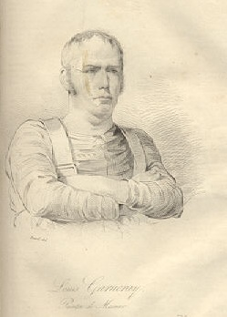 Portrait of Ambroise Louis Garneray